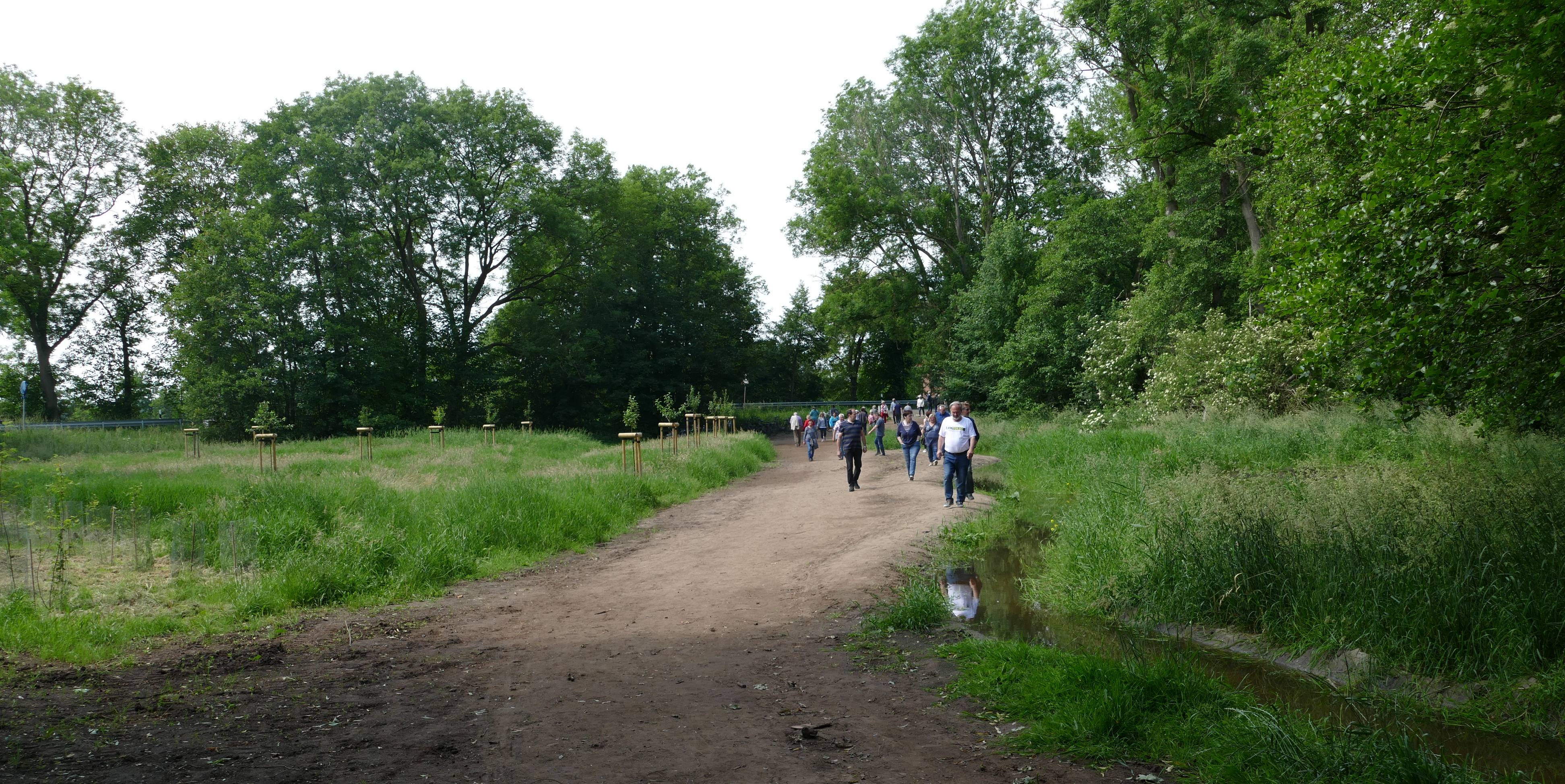 Neben dem Abzweig von der Lune zur Mühle (rechts) ist eine Streuobstwiede angelegt.